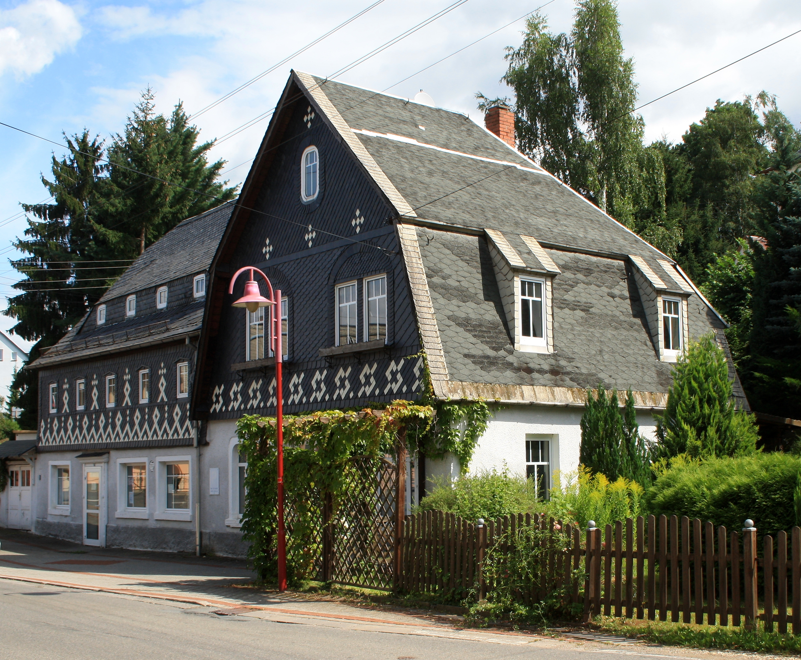 Wohnhaus. Bernsdorf (Landkreis Zwickau). An der Kreuzung B173. Sachsen.